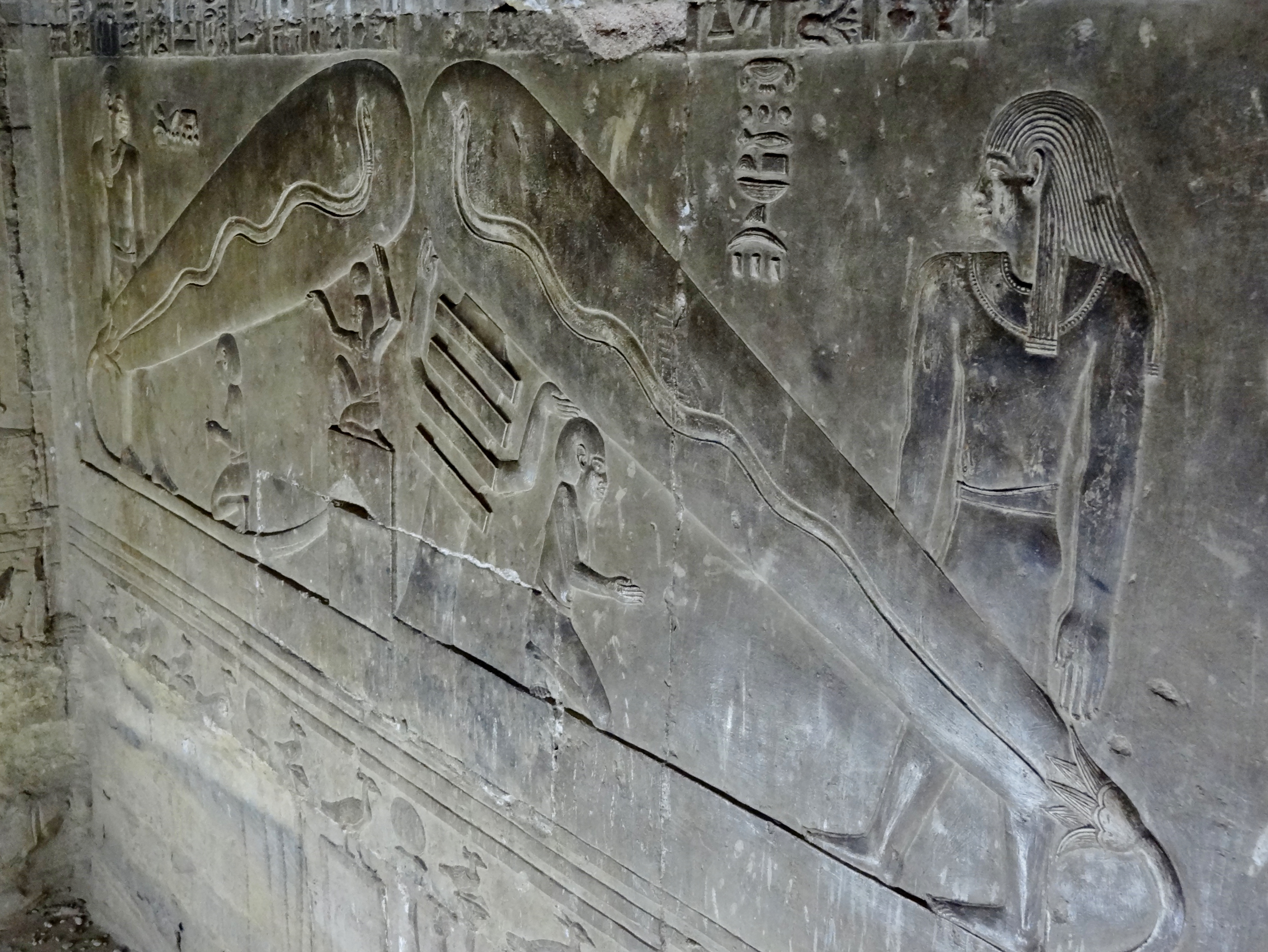 Krypta des Hathor-Tempels von Dendera, Ägypten